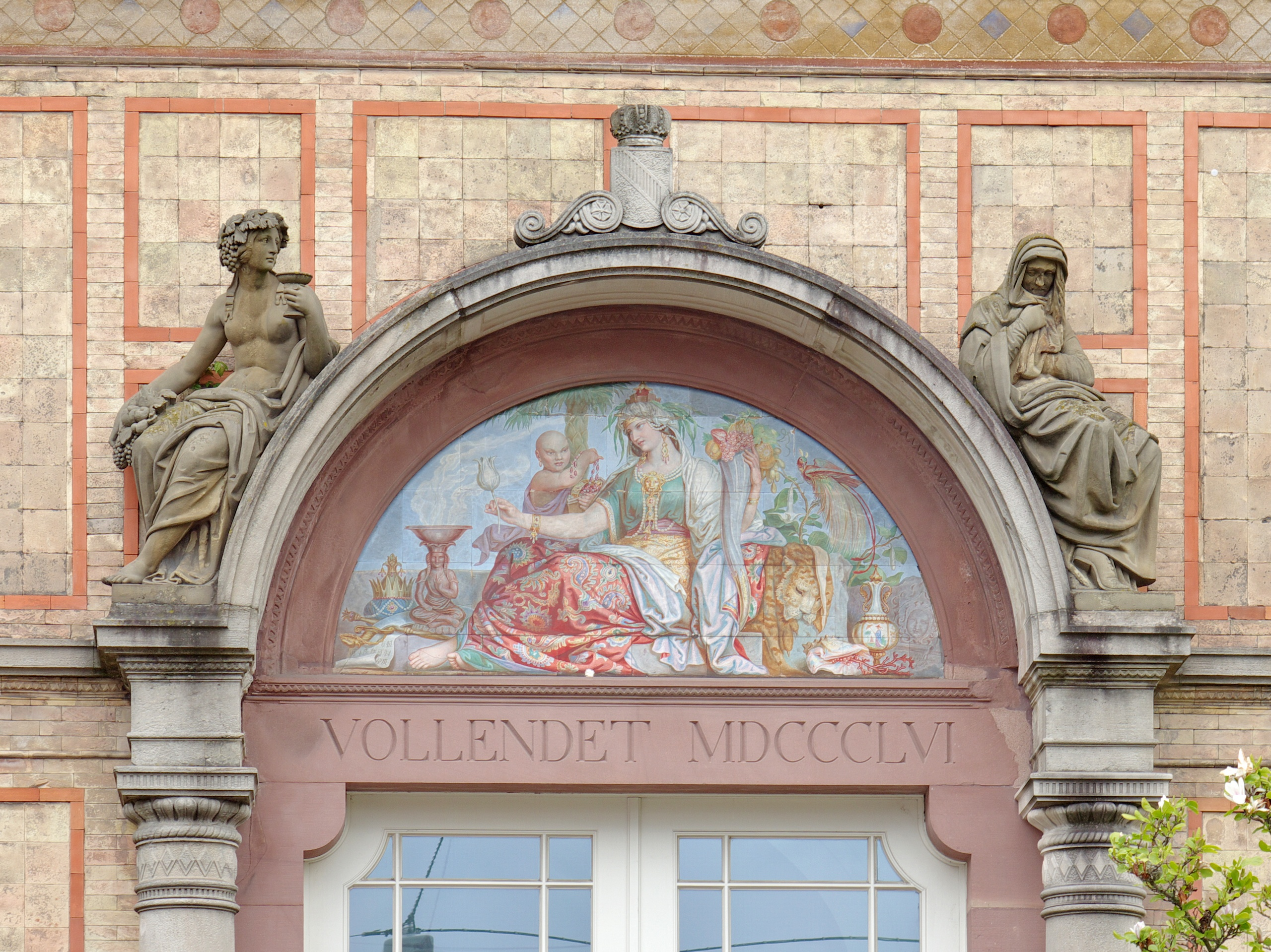 Portal am Südpavillon der Karlsruher Orangerie